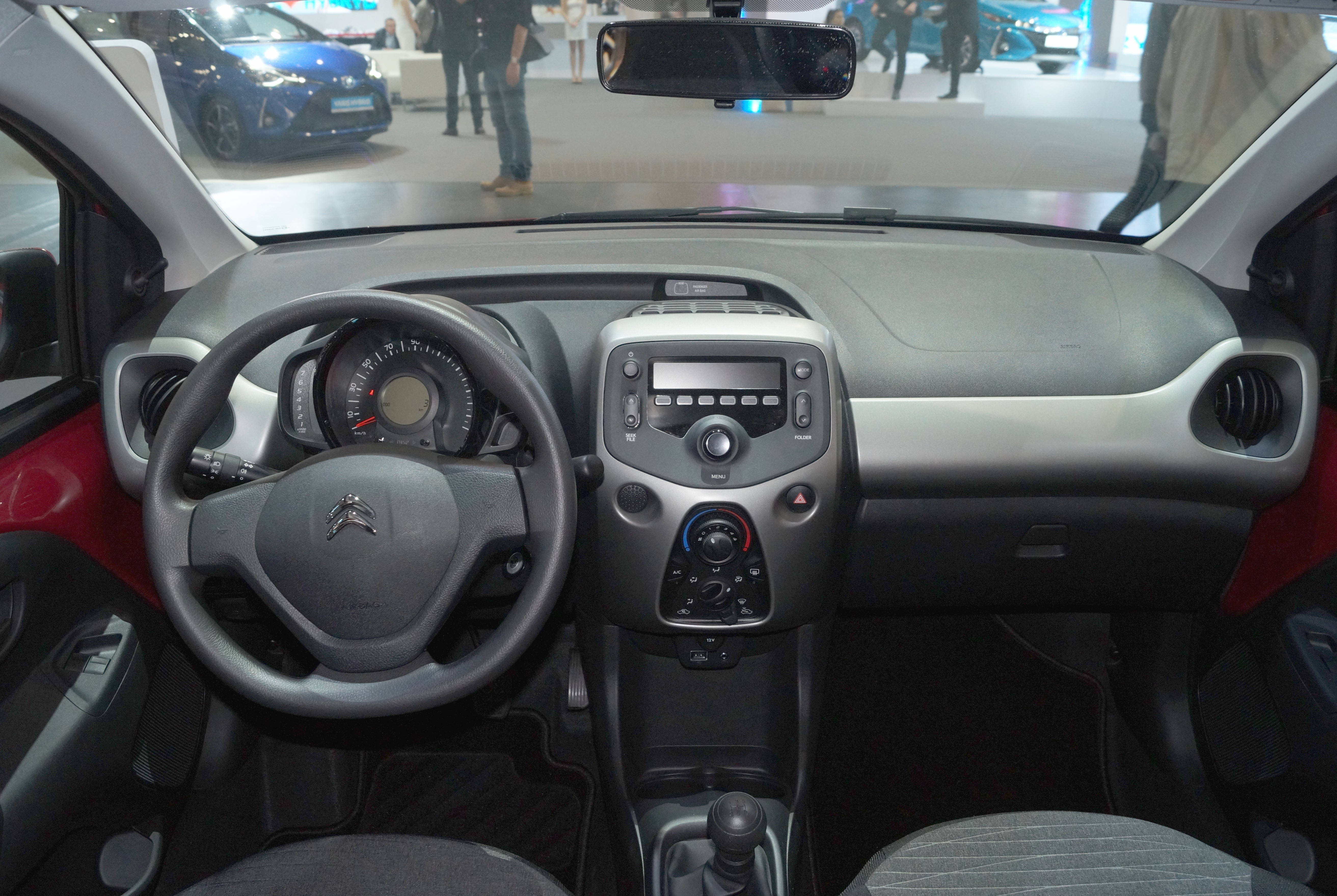 Wnętrze Citroëna C1 na Motor Show Poznań 2017.